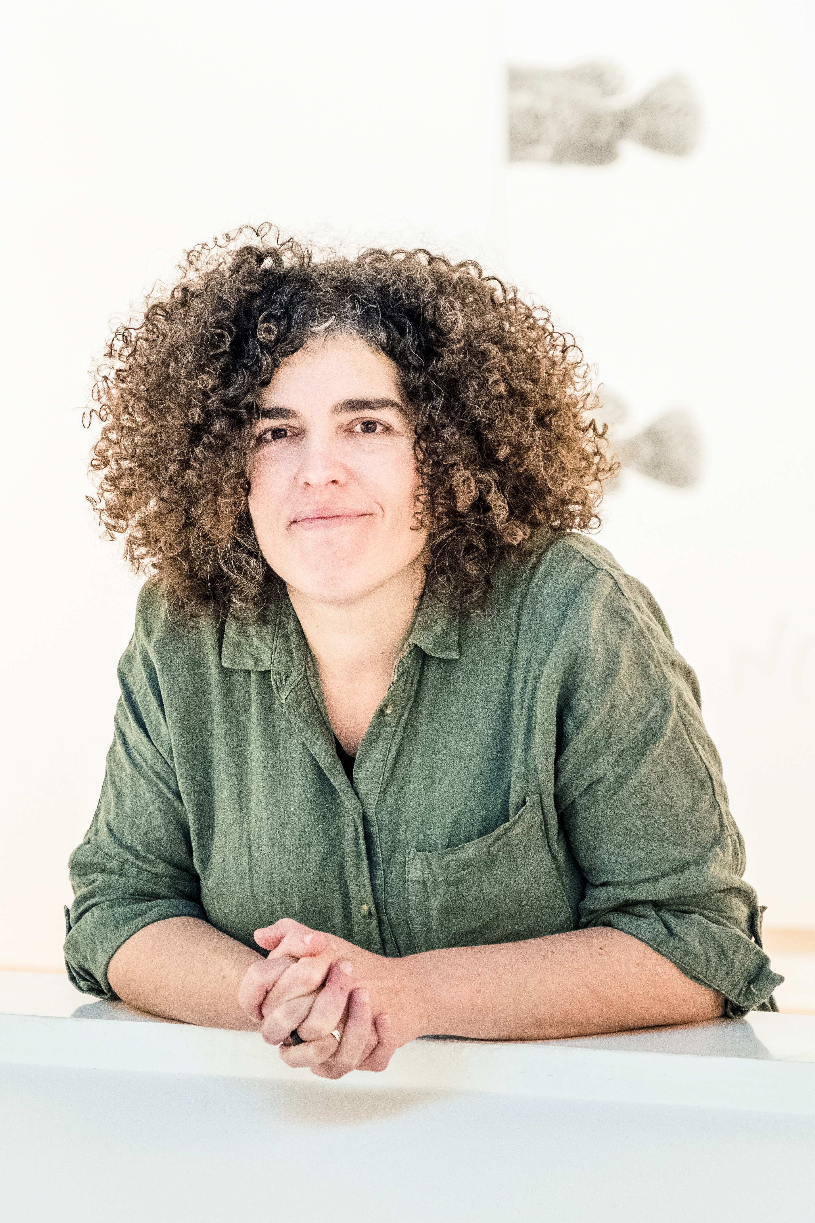 Imaxe da dramaturga Esther F. Carrodeguas no MARCO de Vigo (Novembro 2019).